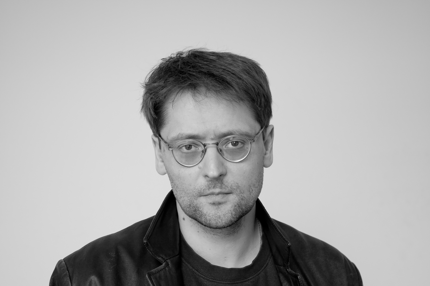 Александр Скоробогатов